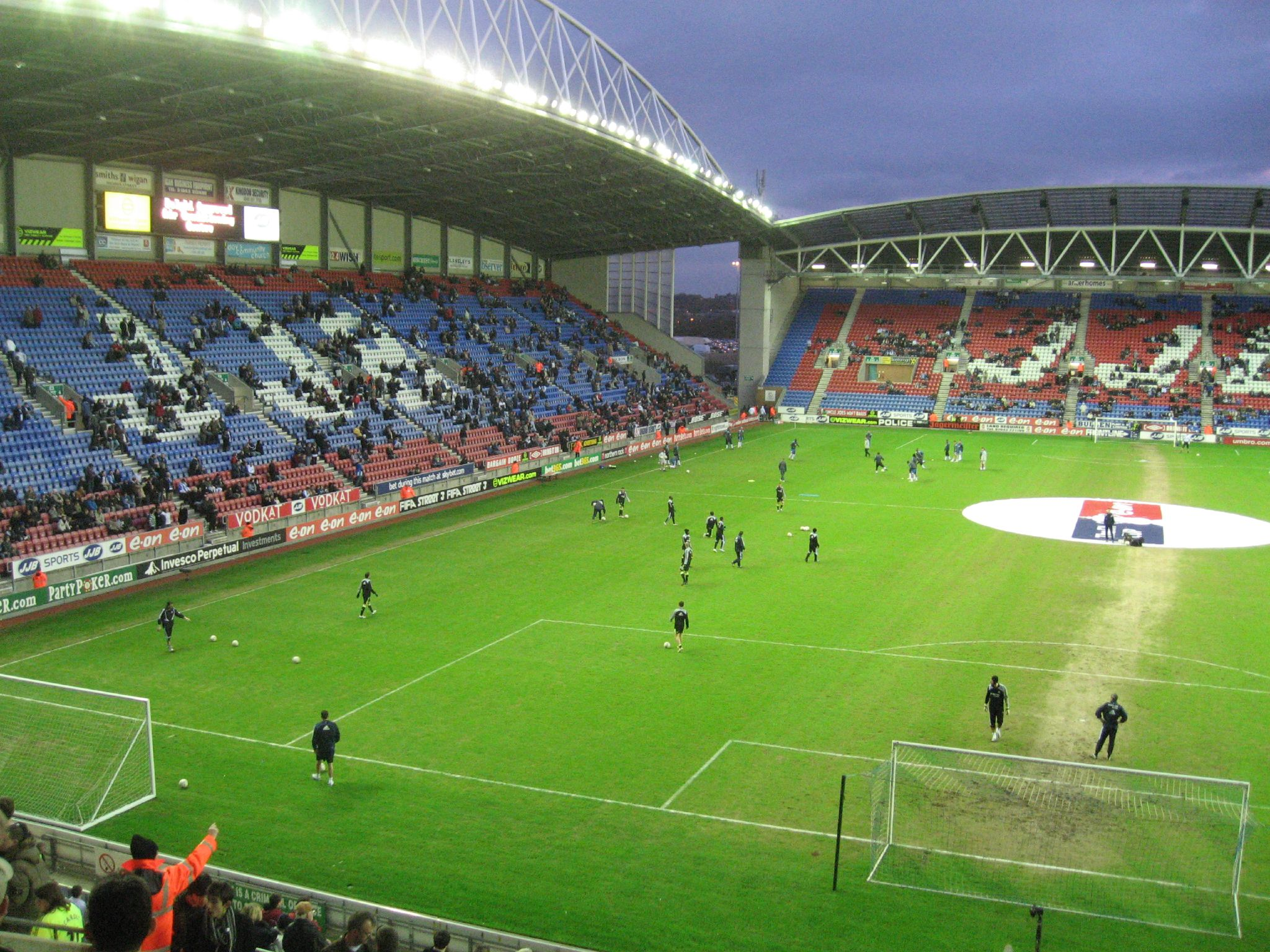 JJB Stadium, Wigan, Greater Manchester, England